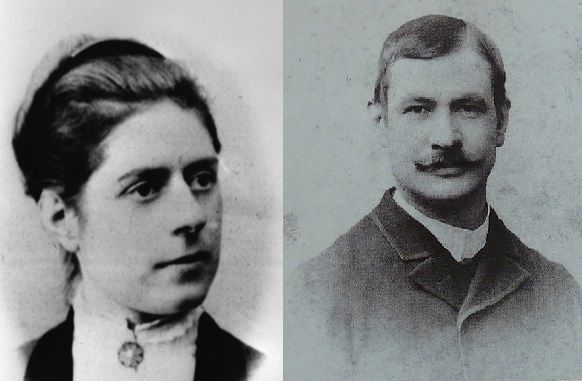 Jeanne Maillot és Henri de Gaulle, Charles de Gaulle szülei